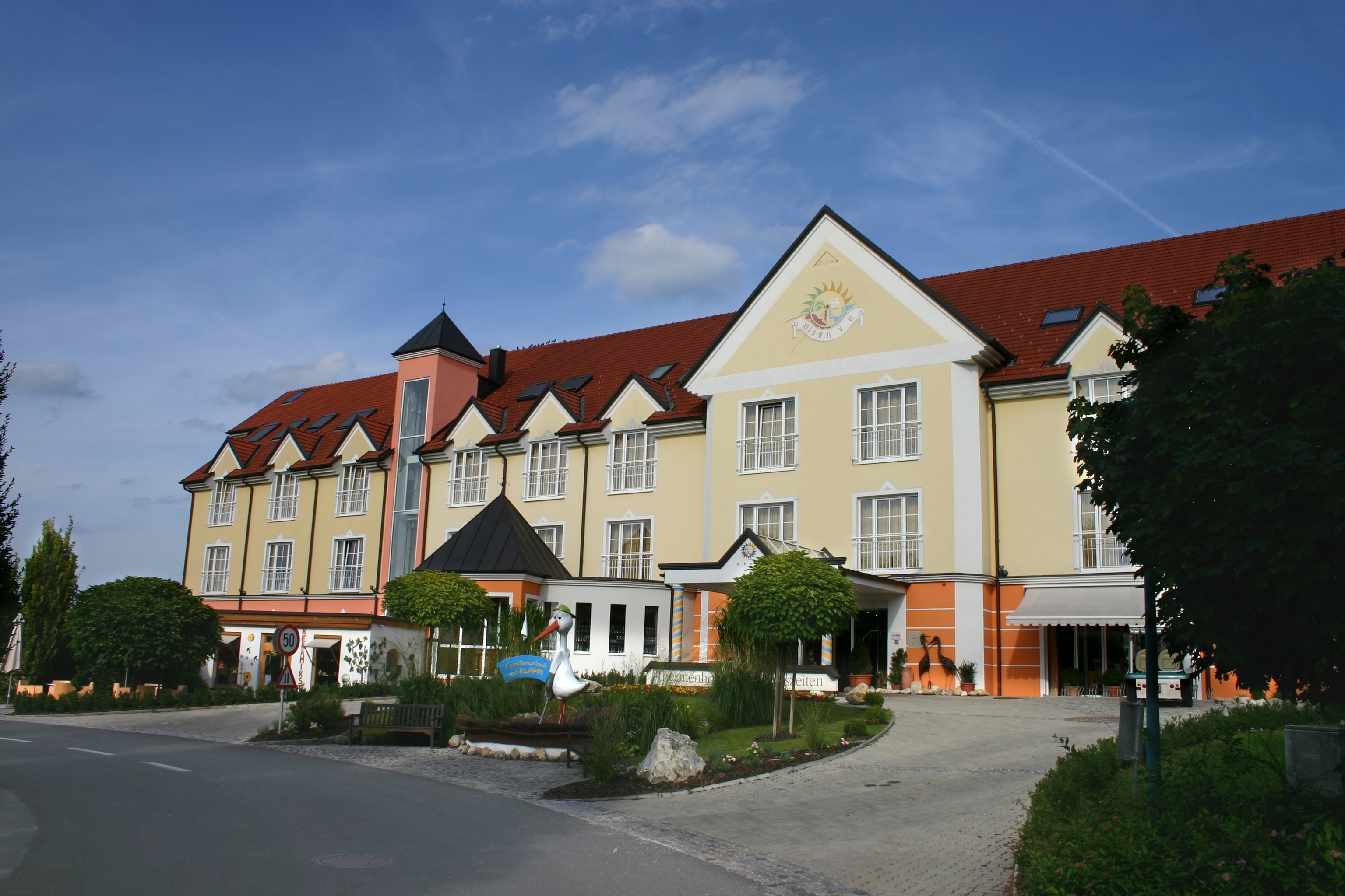 Lutzmannsburg Thermenhotel „Vier Jahreszeiten“